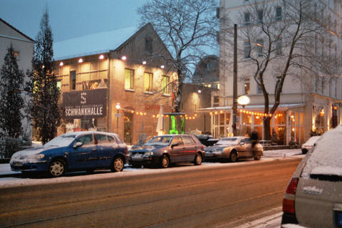 Schwankhalle in Bremen, vom Buntentorsteinweg aus gesehen